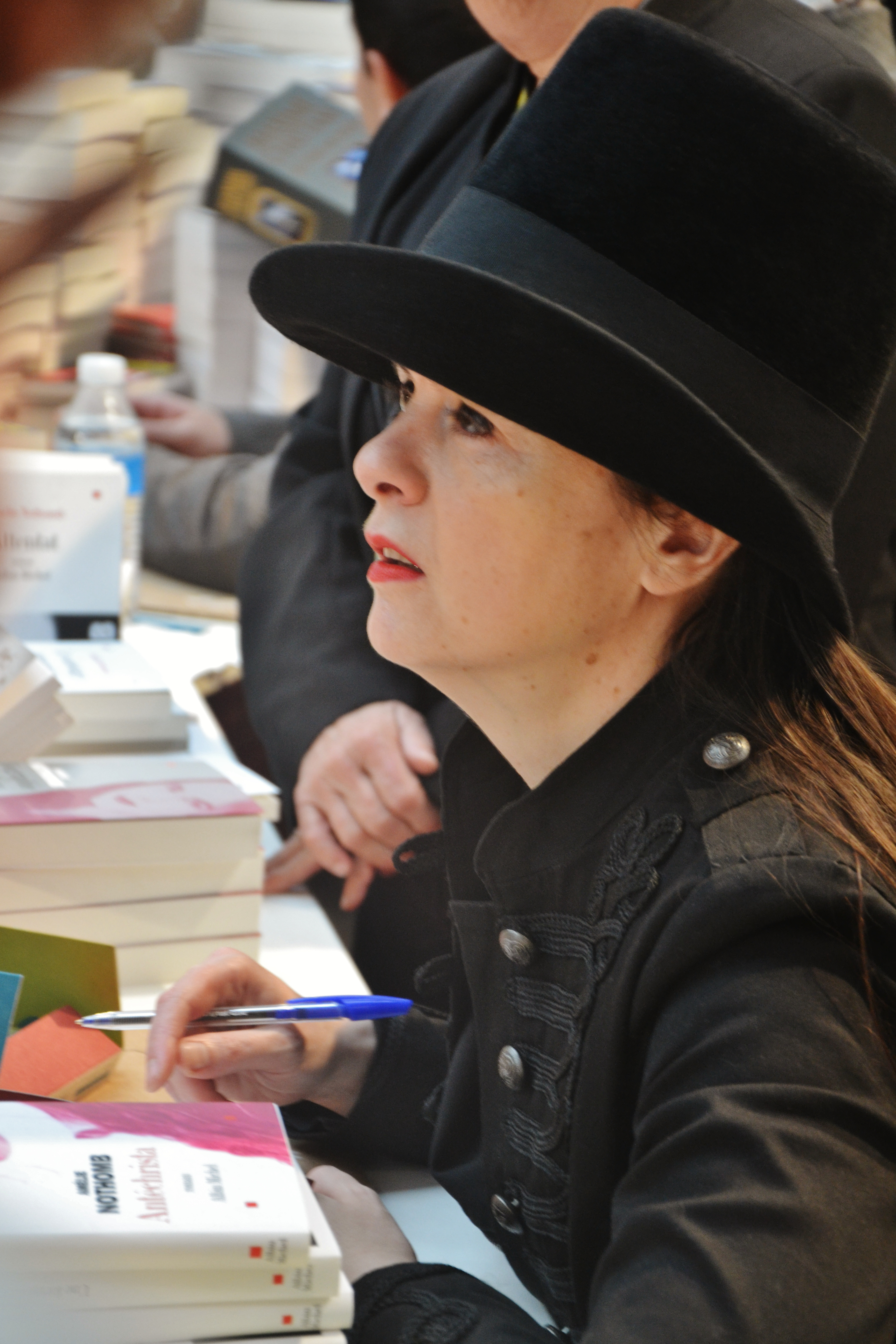 Amélie Nothomb à la 30e Foire du livre de Brive-la-Gaillarde